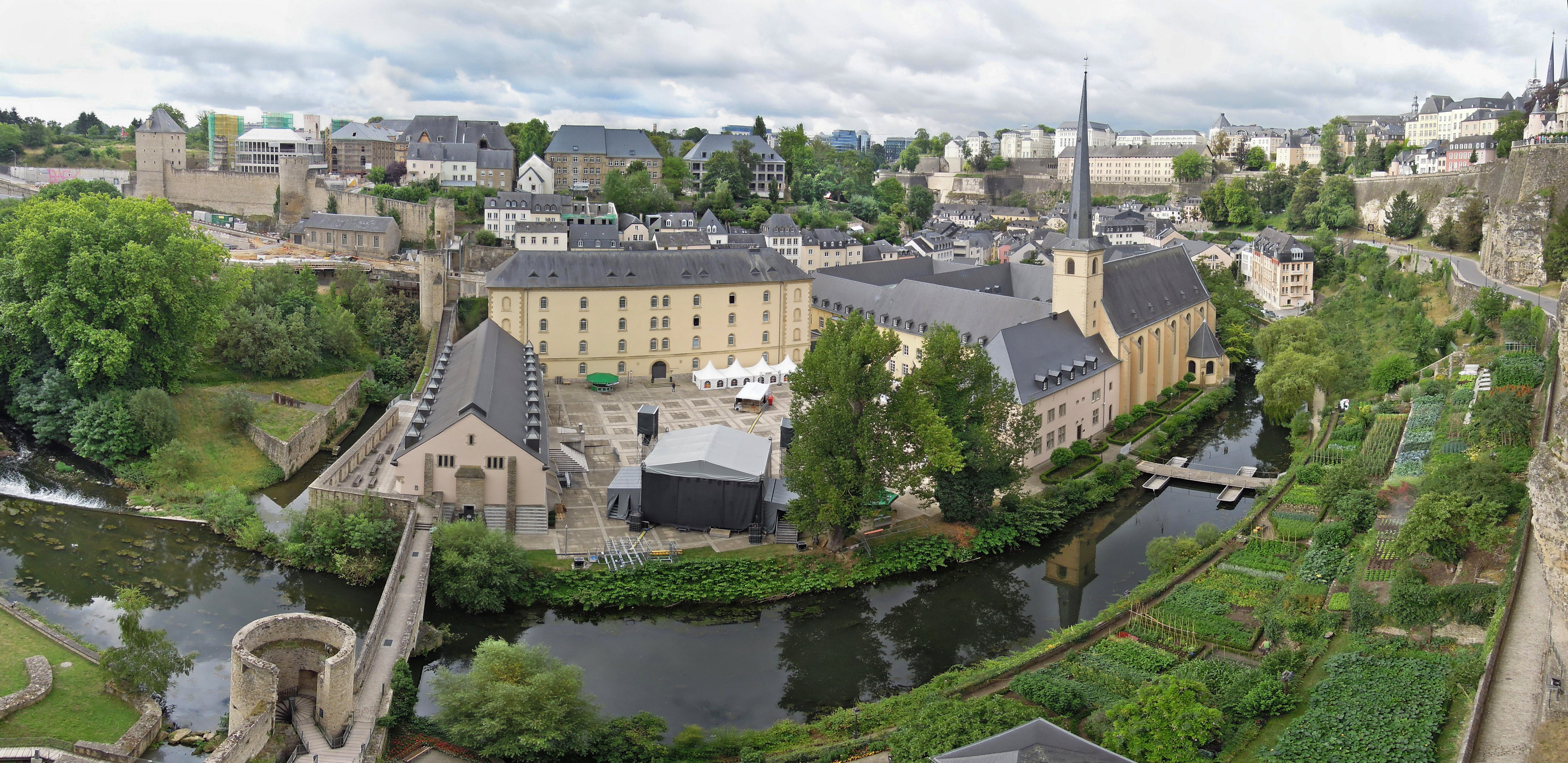 Blick über die Altstadt